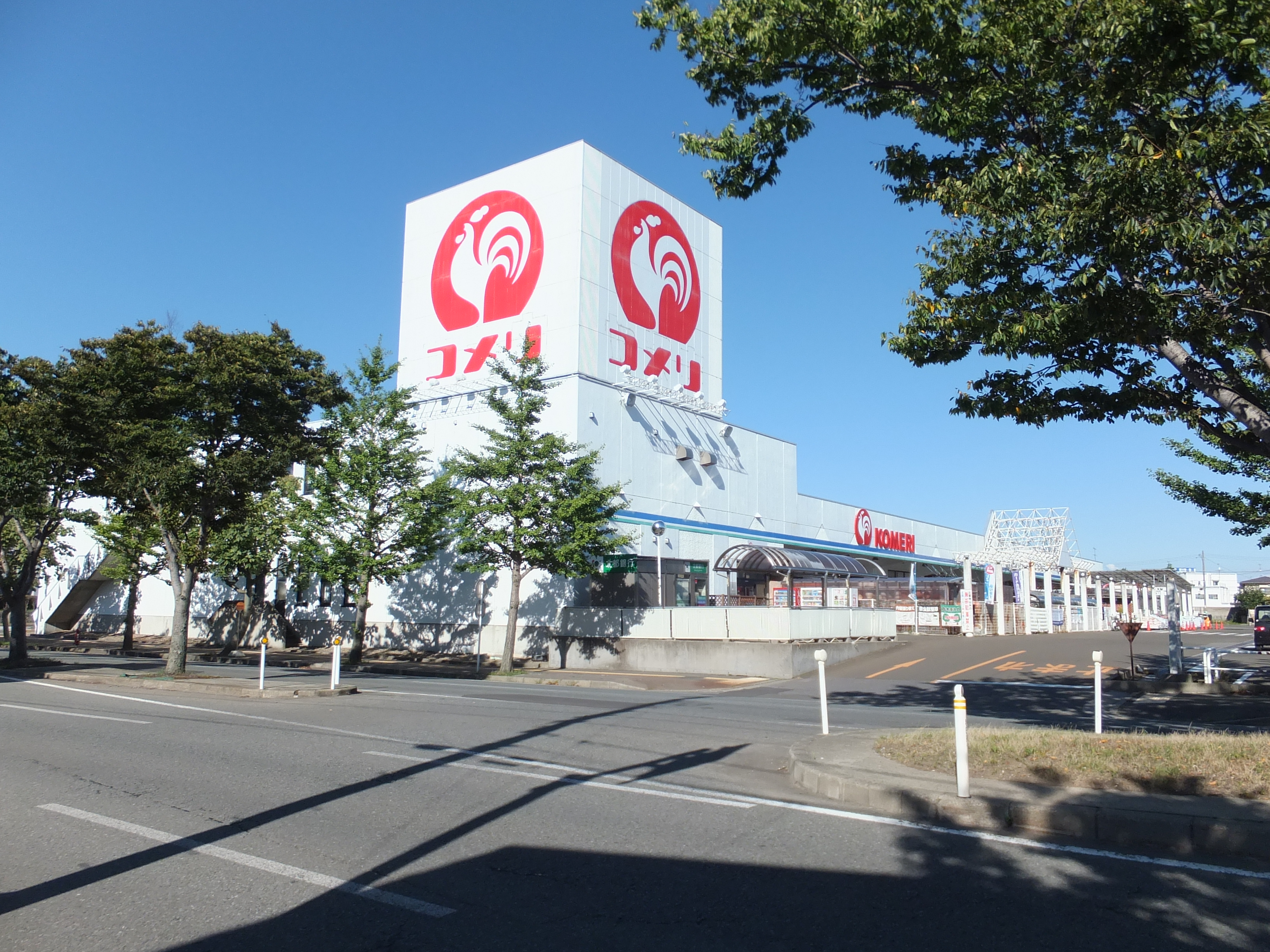 コメリ能代店。かつてこの場所に、地元資本のホームセンター・ヤマキの本店があった。